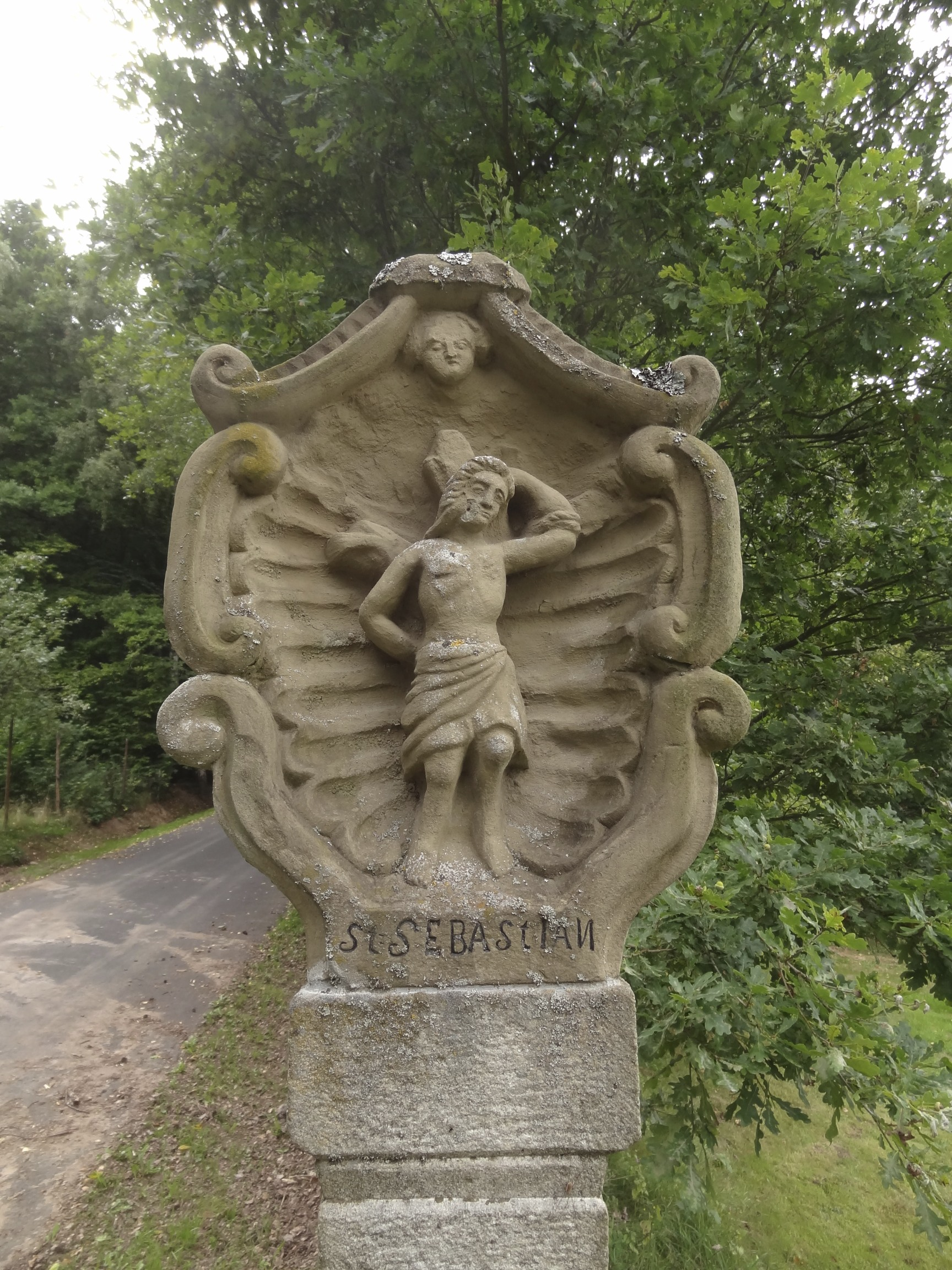 seitlich heiliger Bischof und eine weibliche Heilige, von 1873; ehem. an der Wegabzweigung Rainweg-Saichweg, heute am HerrenwegThis is a photograph of an architectural monument.